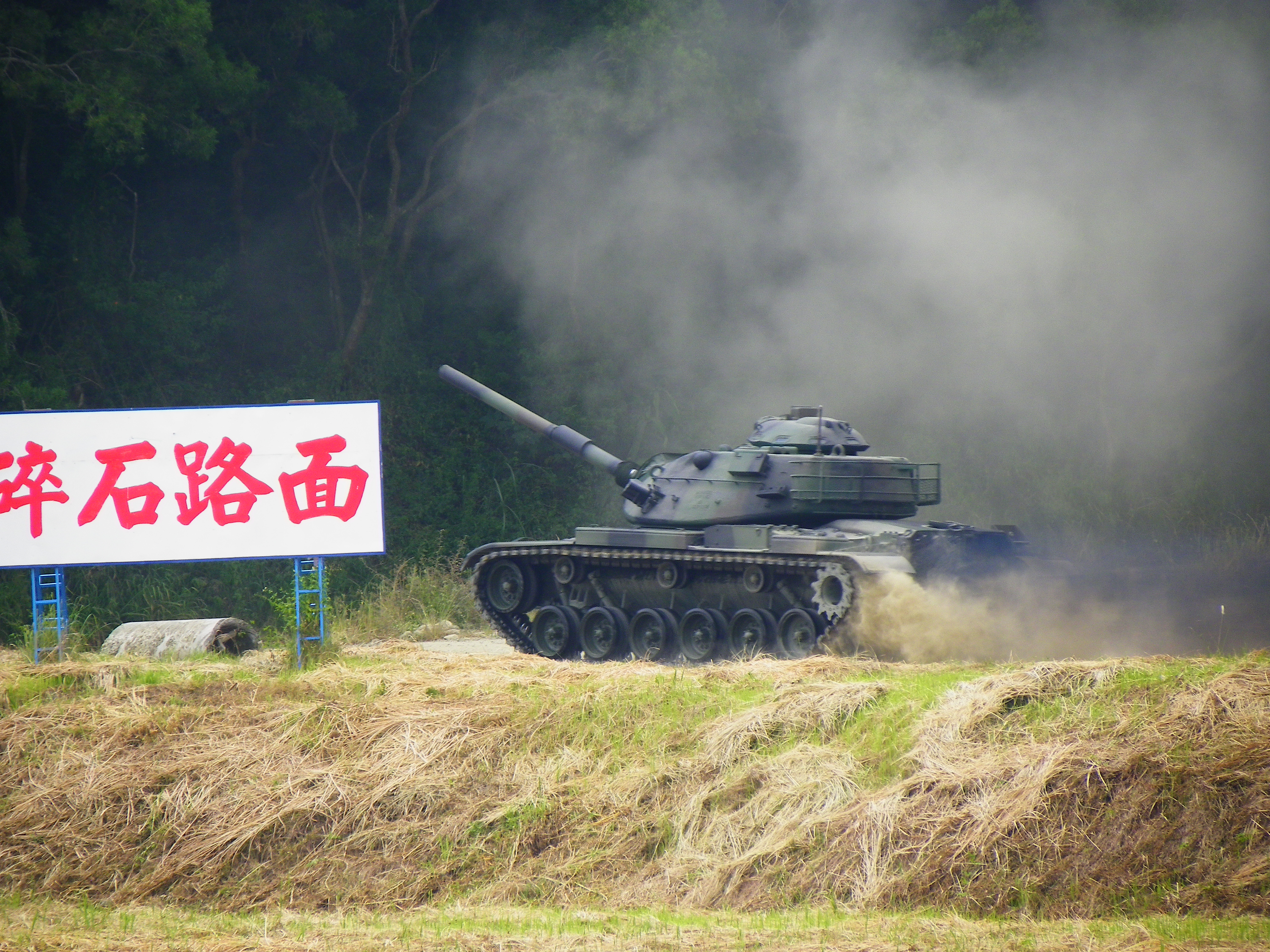 行走碎石路面的M60A3 TTS戰車。